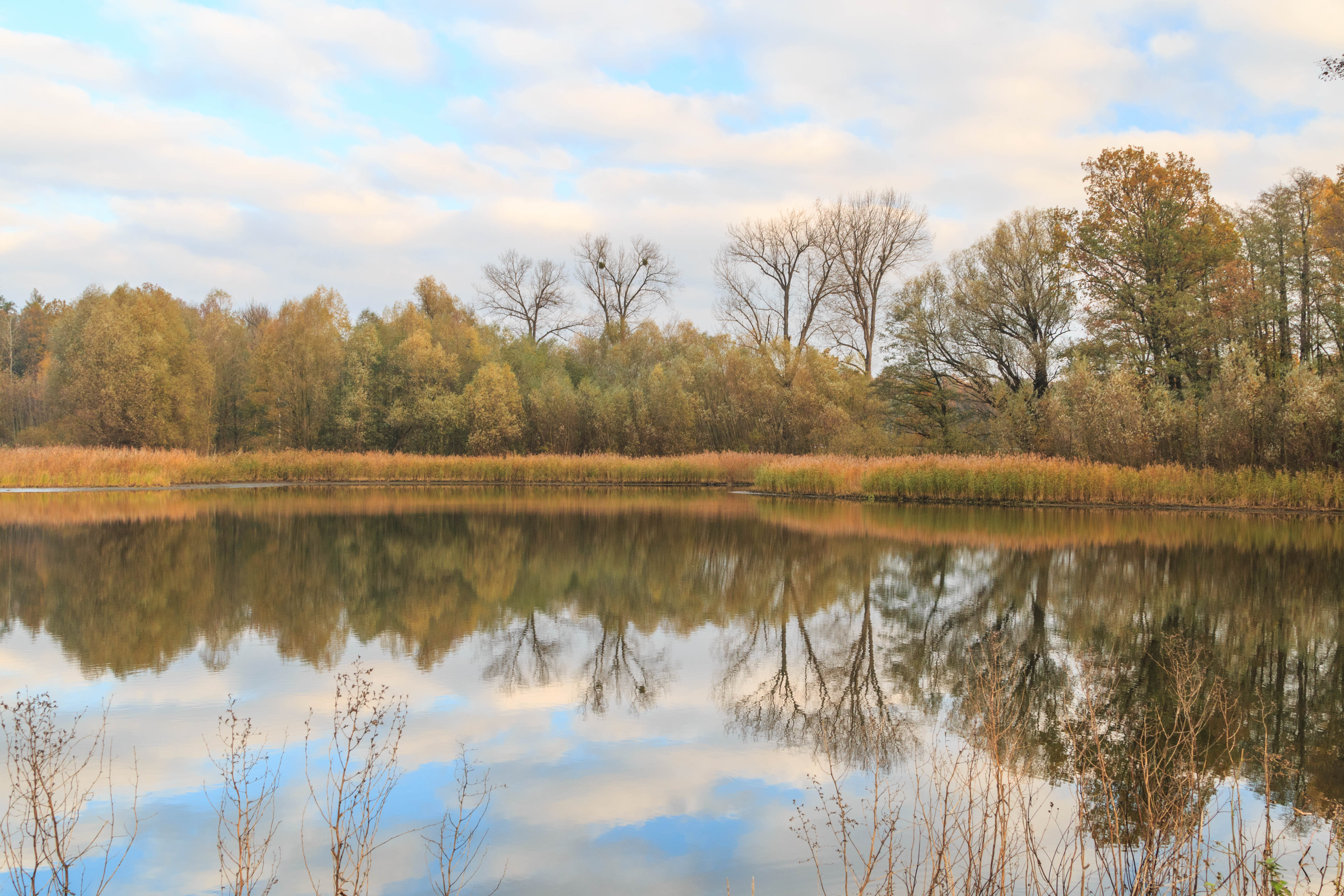 Tichý rybník Project: Vodstvo.